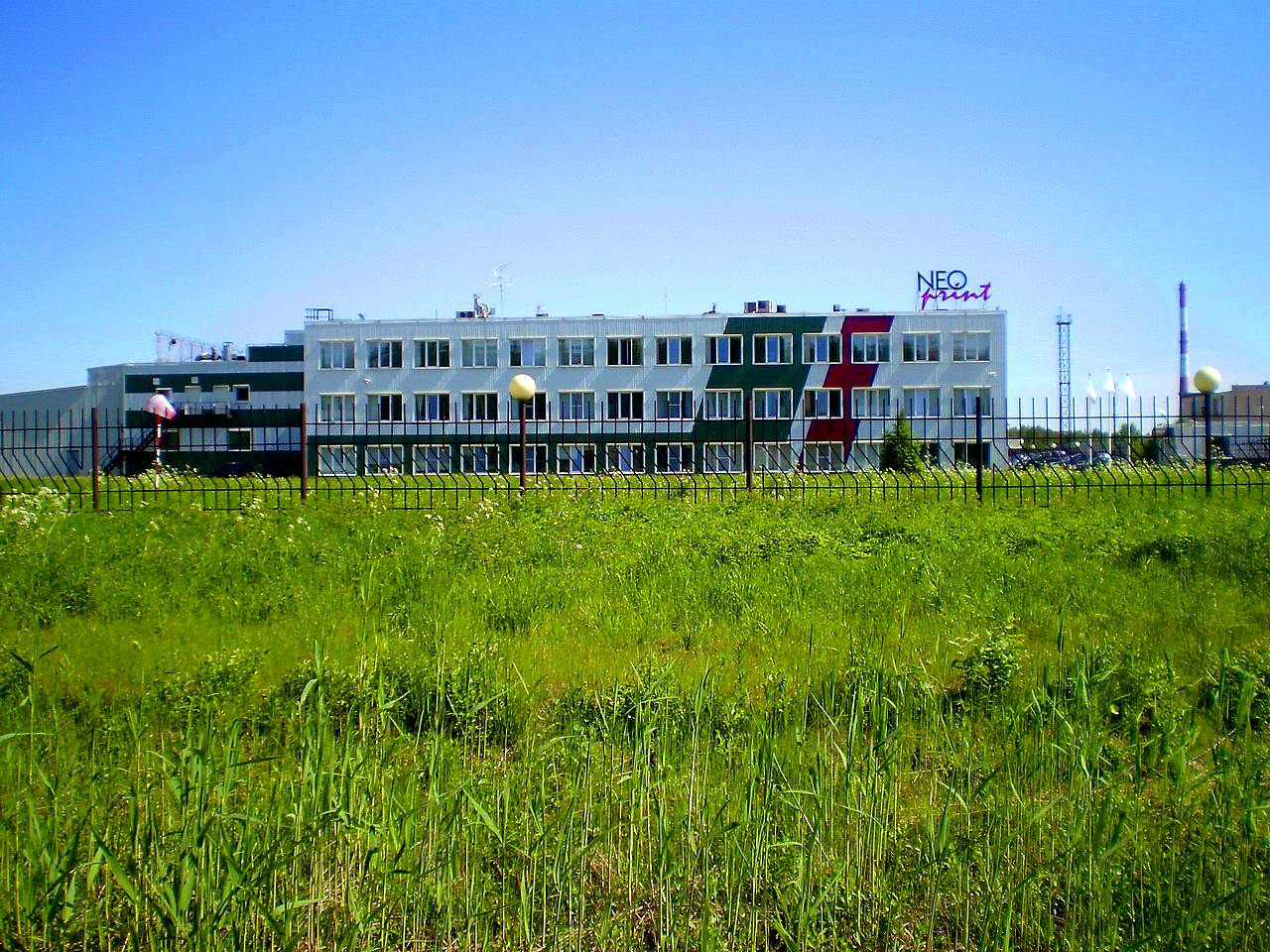 Промзона «Кирпичный Завод». 2011 г.